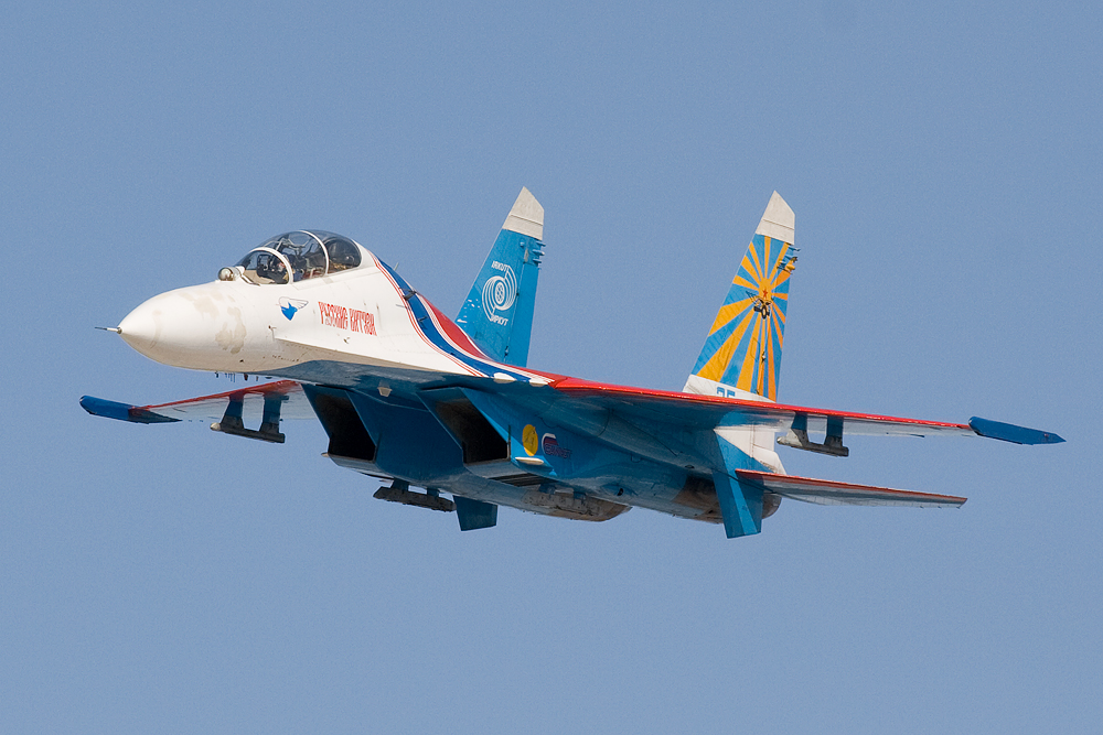 Su-27ub low pass